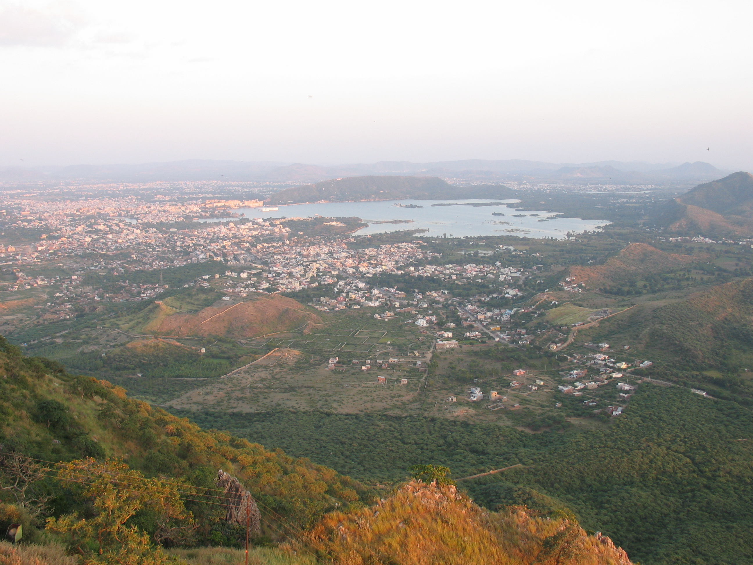 Udaipur vue de Sajjan Garh (palais de la mousson) / Udaipur view from Sajjan Garh (Monsoon Palace)